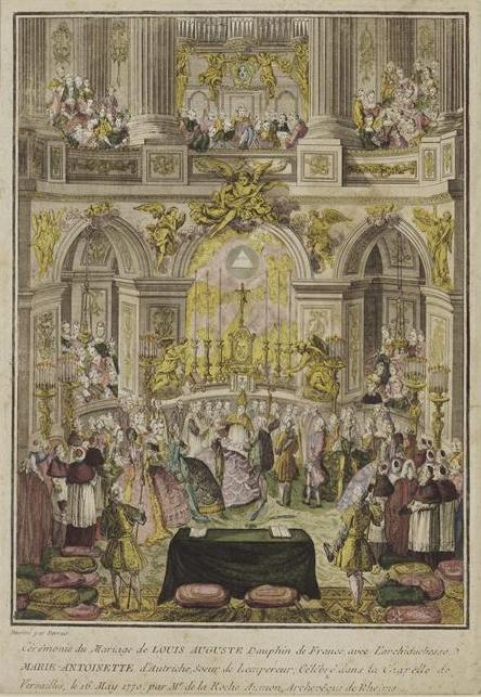 Cérémonie du mariage du Dauphin de France Louis-Auguste, futur Louis XVI avec l'archiduchesse Marie-Antoinette célébrée par Monseigneur de La Roche-Aymon, archevêque de Reims dans la chapelle Royale de Versailles le 16 mai 1770, estampe, Musée national des châteaux de Versailles et de Trianon.